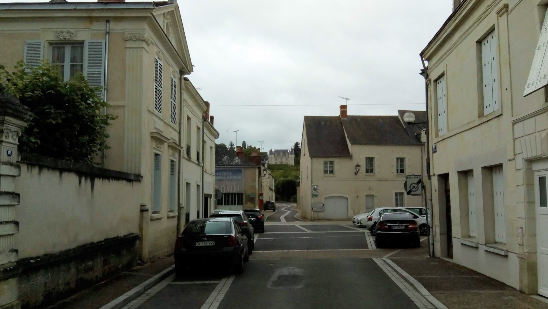 L'Île-Bouchard, vue depuis la rue de la République